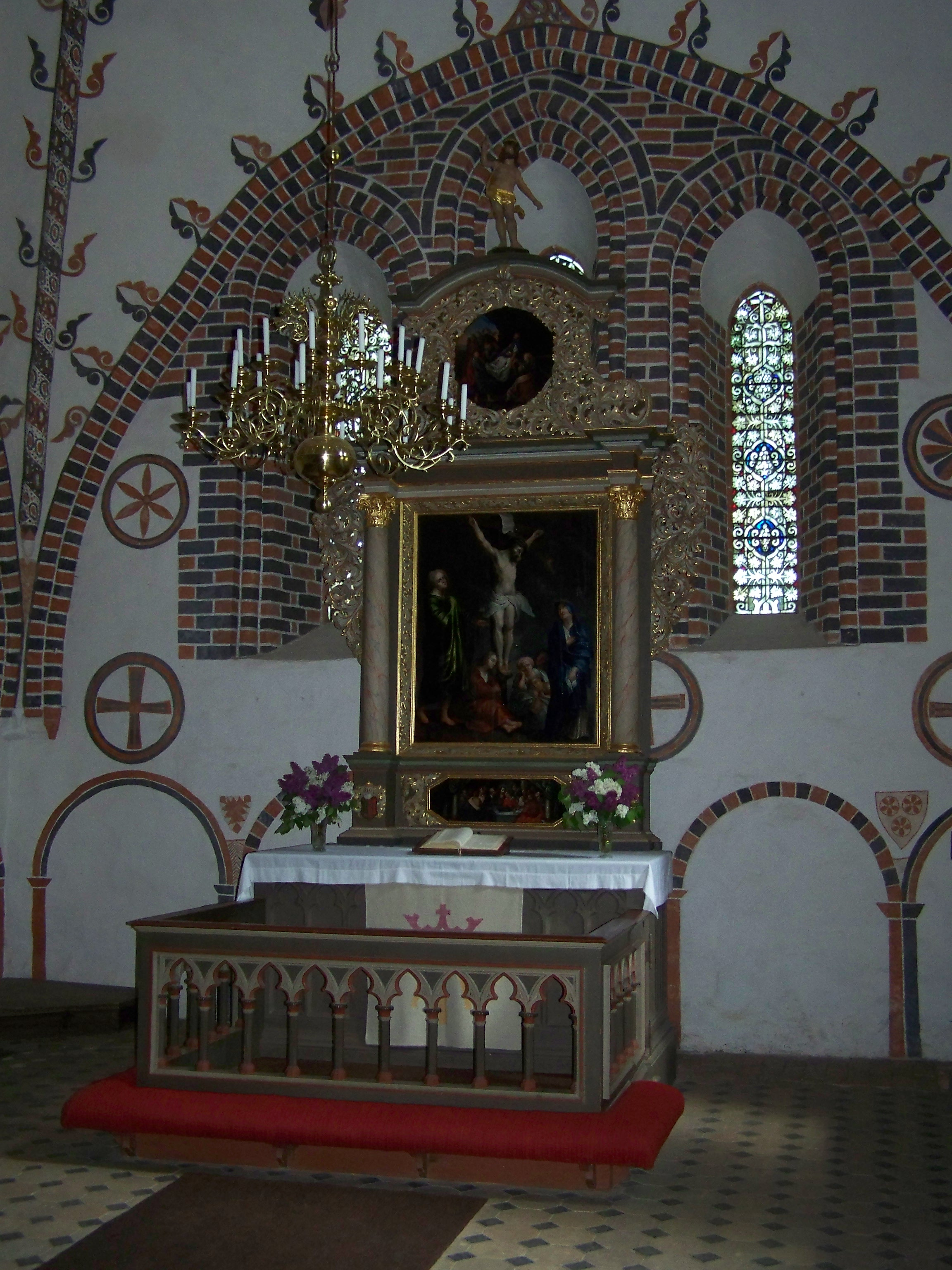 Kirche in Kirch Baggendorf, Vorpommern, Altar (2009-05-13)